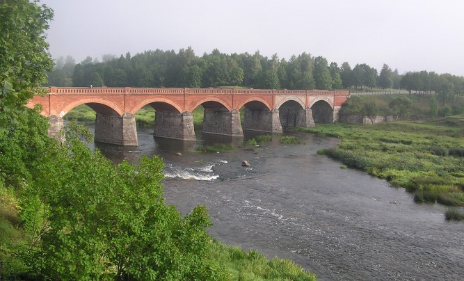 Старейший кирпичный мост Европы. Один из самых длинных арочных мостов Европы.